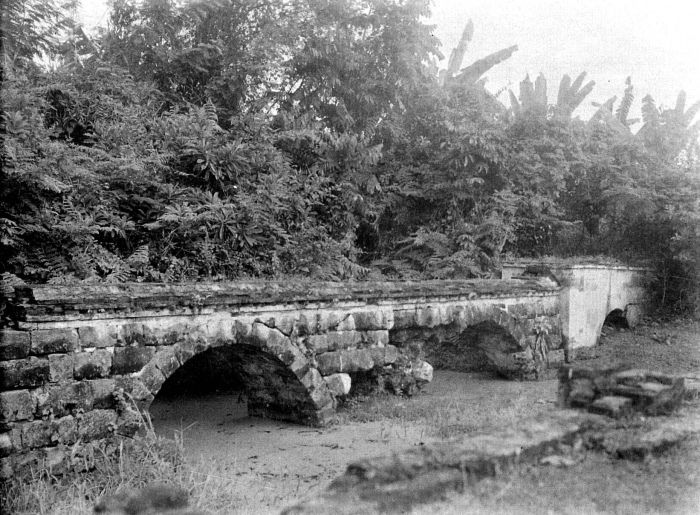 Negatief. Aquaduct te Bantam, gebouwd door de metselaar Kardeel